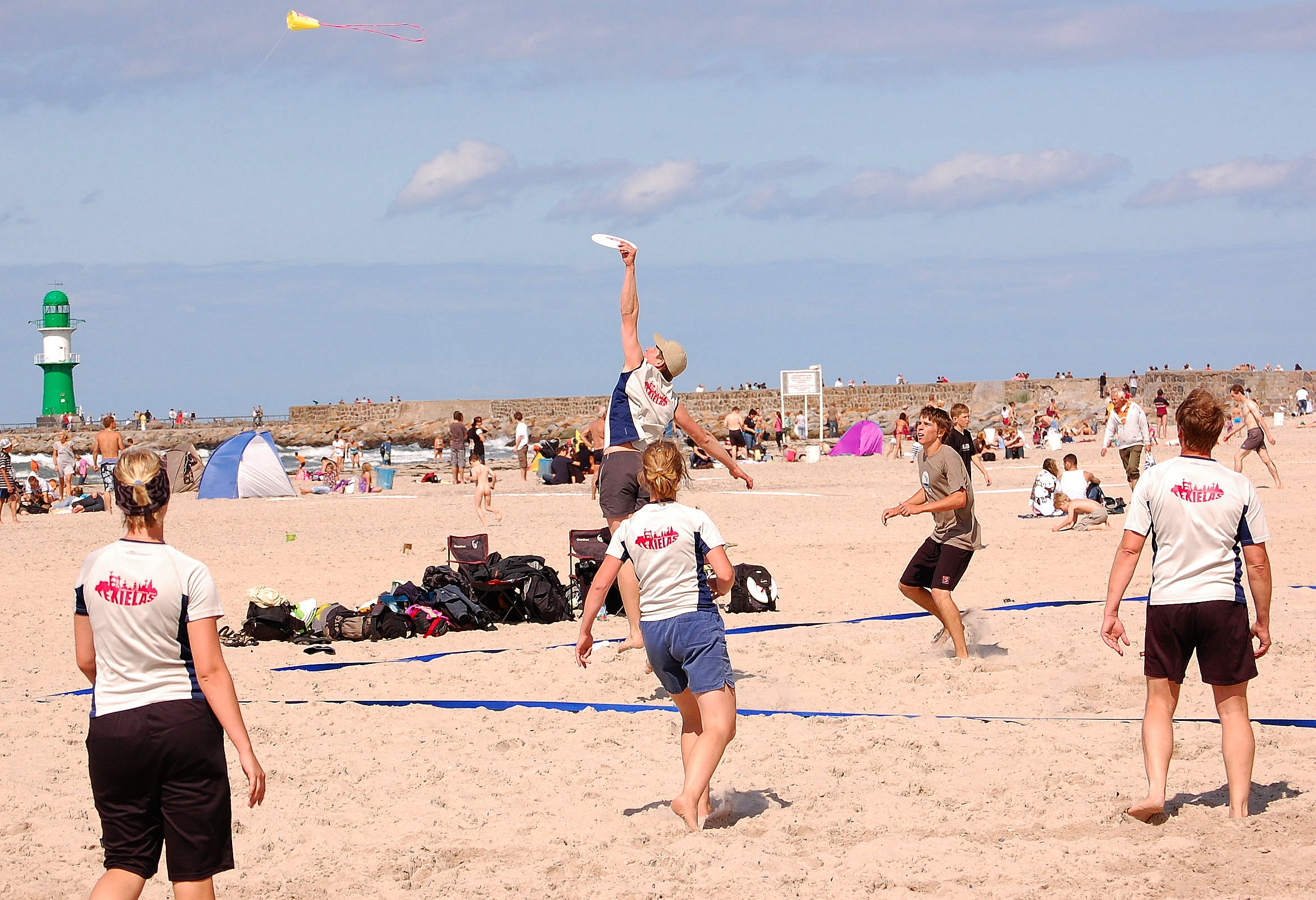 Sch�ner Sprung.....